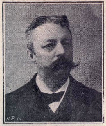 Albert de Saint-Albin né le 16 février 1843 à Paris , mort le 18 décembre 1901 à Paris 9e, est un auteur dramatique, journaliste, chansonnier et librettiste français.